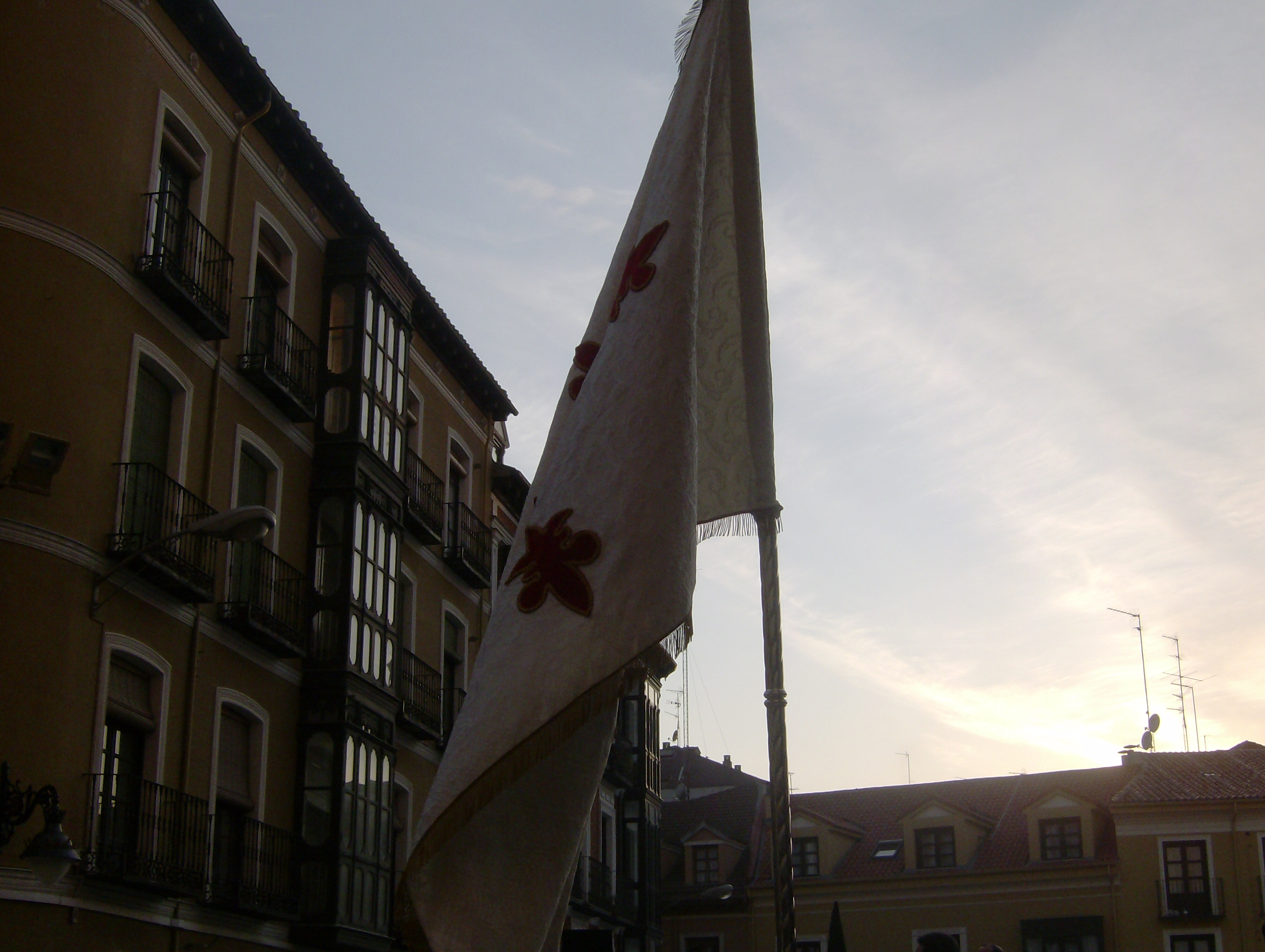 Bandera de la Cofradia de Jesus Resucitado (Valladolid)